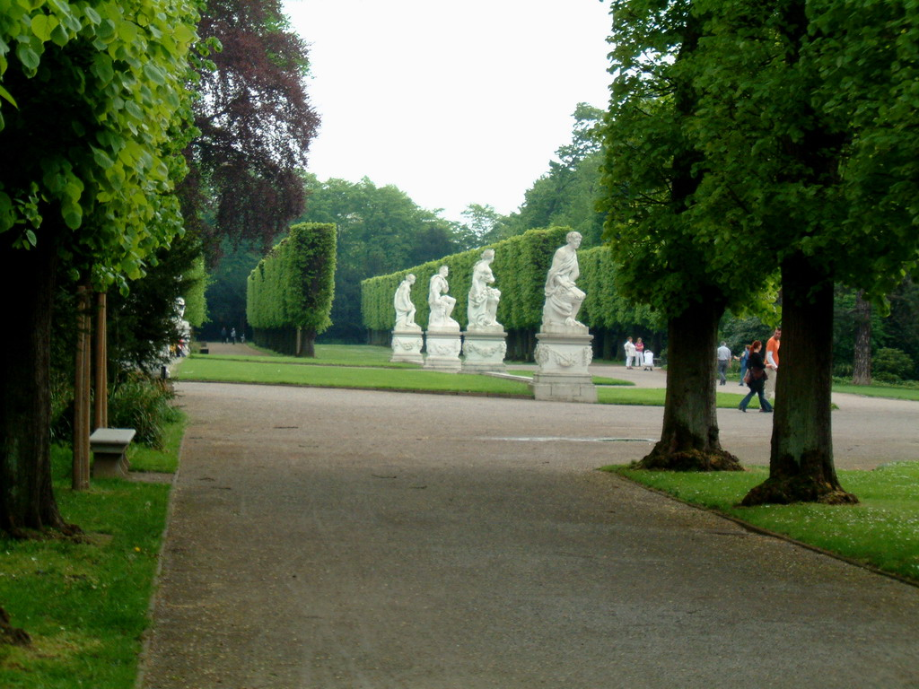 Der Garten des Benrather Schlosses